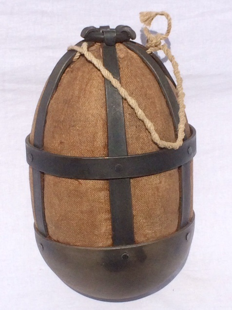 Karkasse (Rekonstruktion) mit typischer eiserner Bodenkalotte, seitlichen Eisenstreben und innen liegendem Brandmittelsack. Zusätzlich wurde eine Trageschlaufe angebracht.